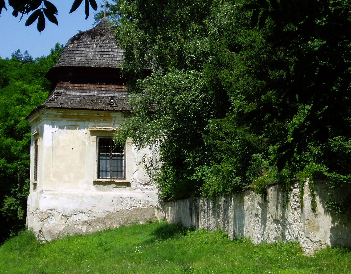 Mayerling - Pavillon des Jagdschlosses von Kronprinz Rudolf.